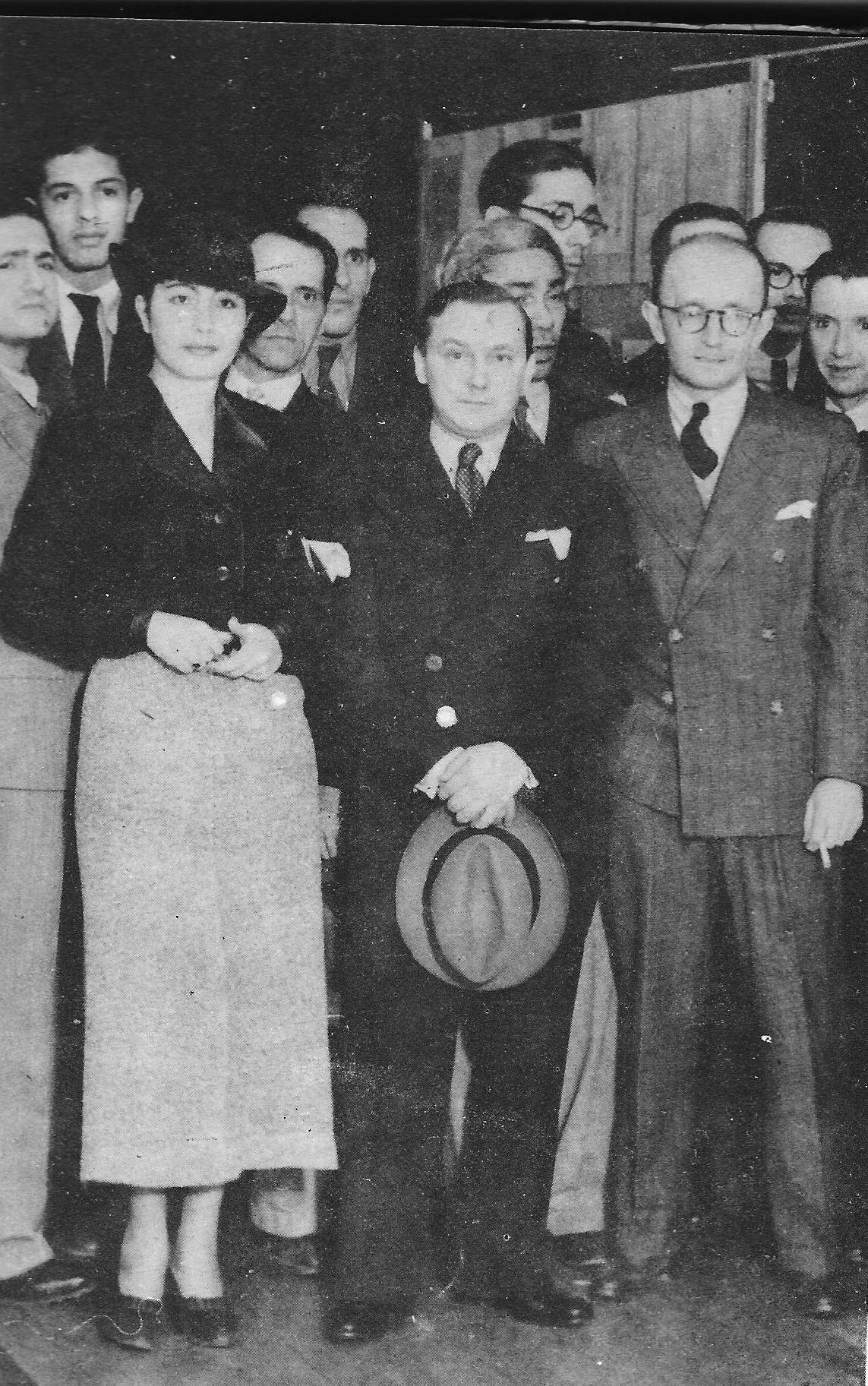 O escritor Aníbal Machado (de óculos) e o pintor Cândido Portinari, ao centro, e sua mulher. Noêmia. Foto tomada em exposição do pintor, não identificadas as demais pessoas retratadas.